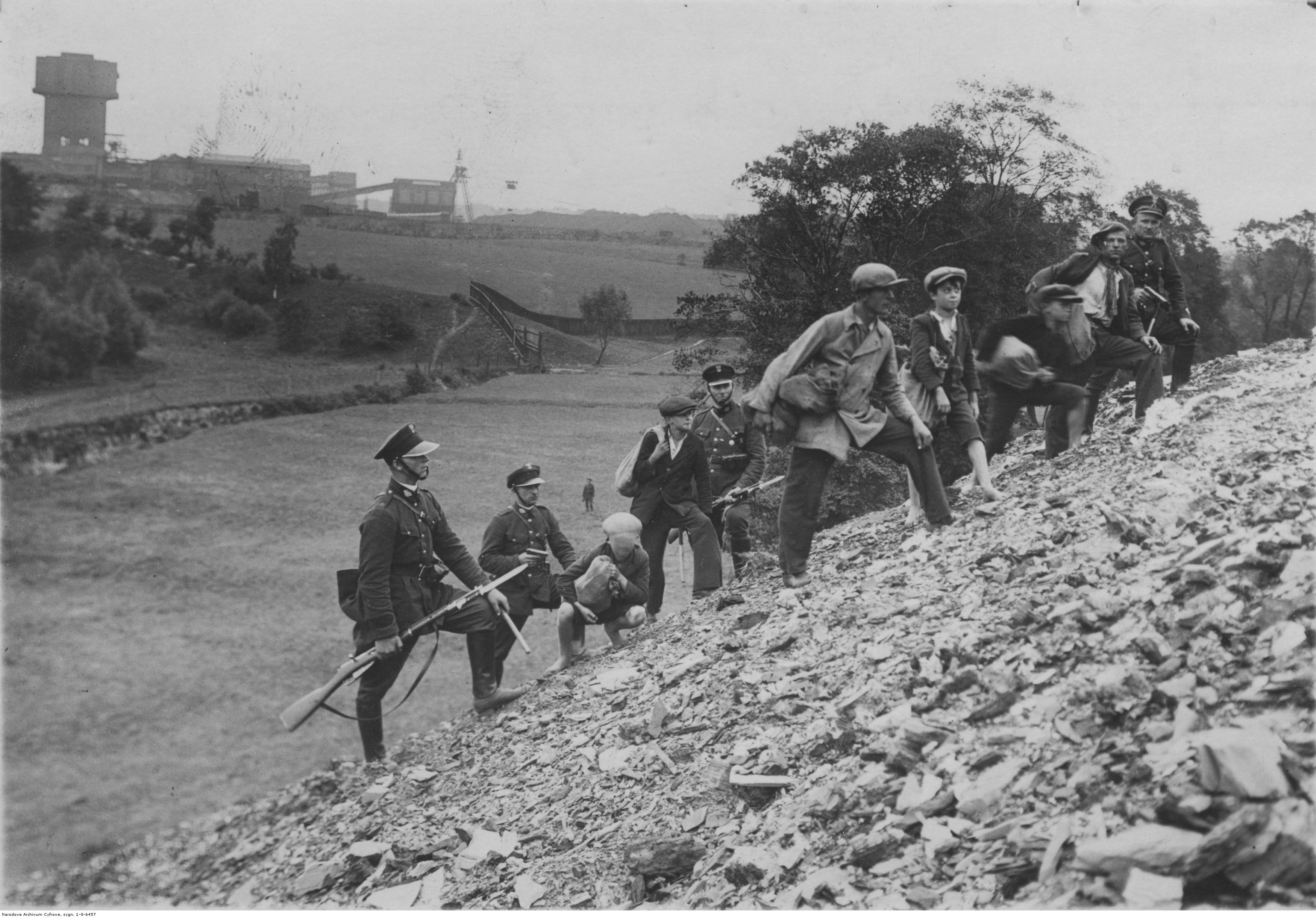 Straż Graniczna eskortuje grupę przemytników na Górnym Śląsku. Koncern Ilustrowany Kurier Codzienny - Archiwum Ilustracji. Sygnatura: 1-G-6457